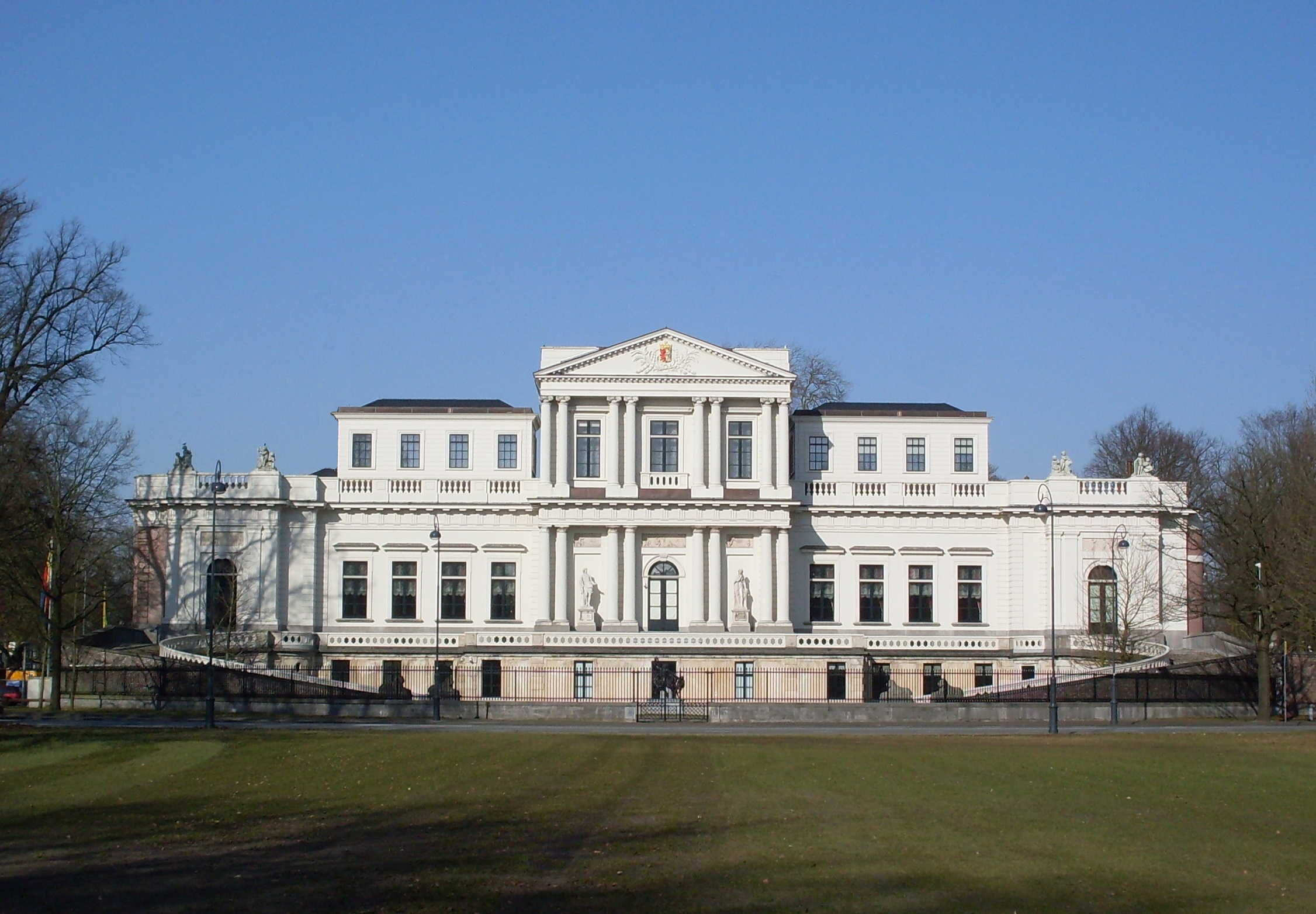 Dreef 3, Haarlem